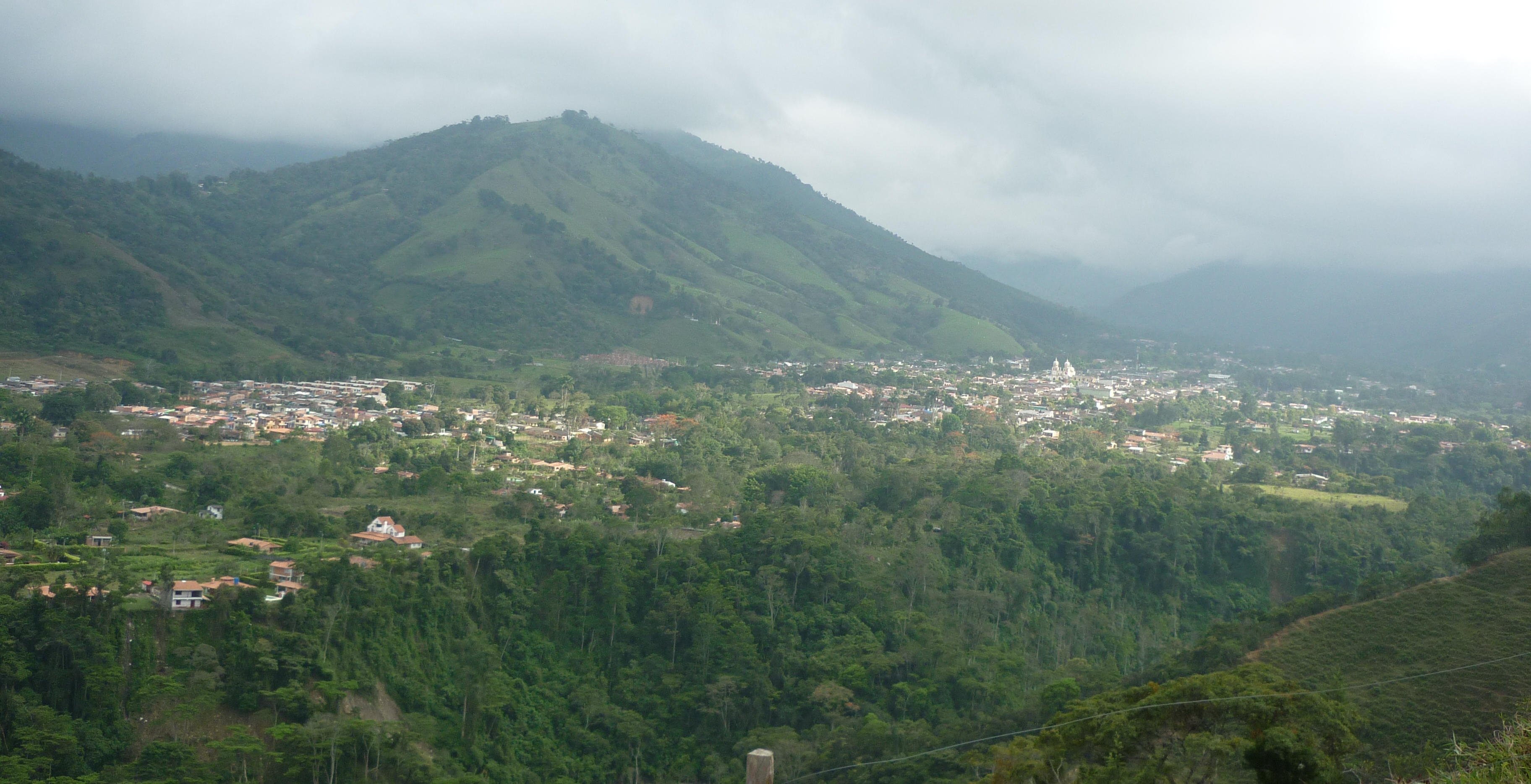 Panoramica de Chinacota